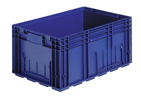 R-KLT 6429 nach VDA-Standard